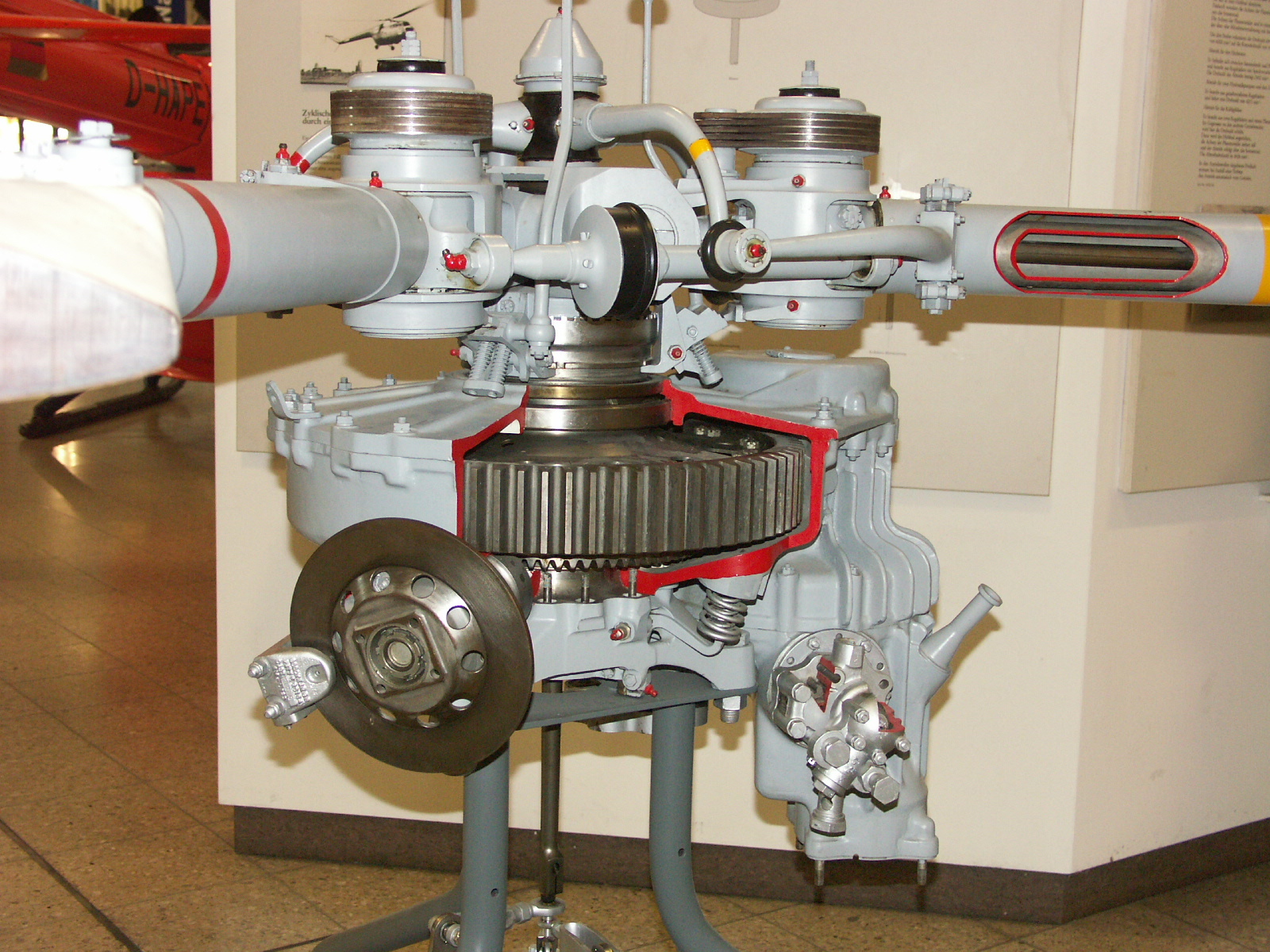 Deutsches Museum Munich Photo Jean-Patrick Donzey